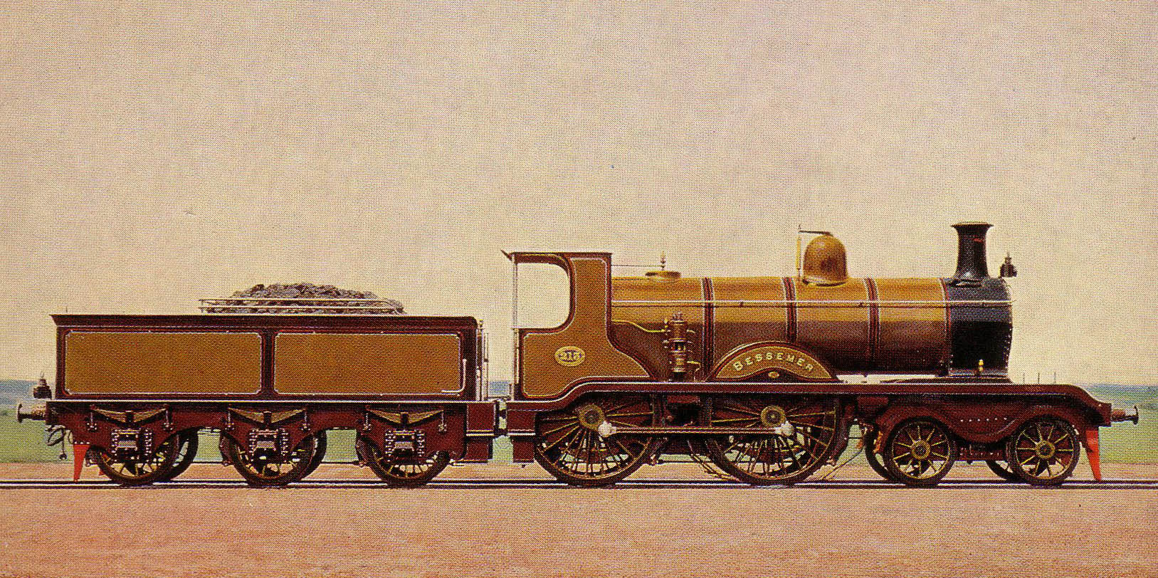 B2 Class 213 "Bessemer"